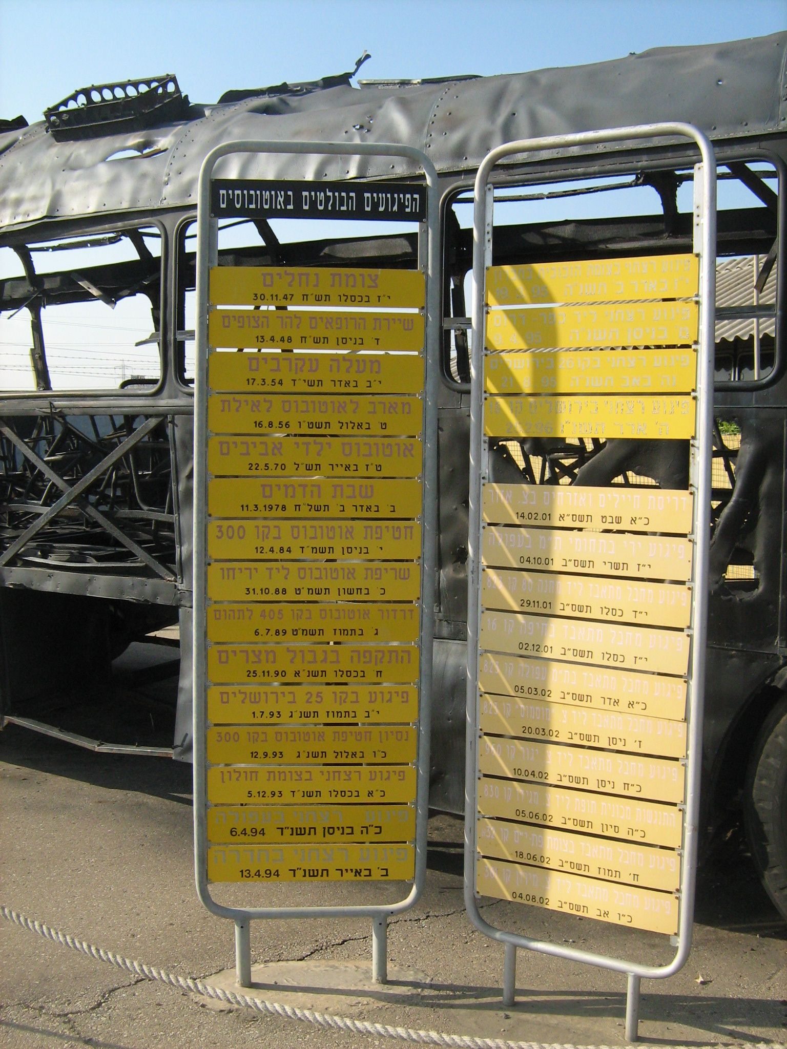 מוזיאון אגד בחולון